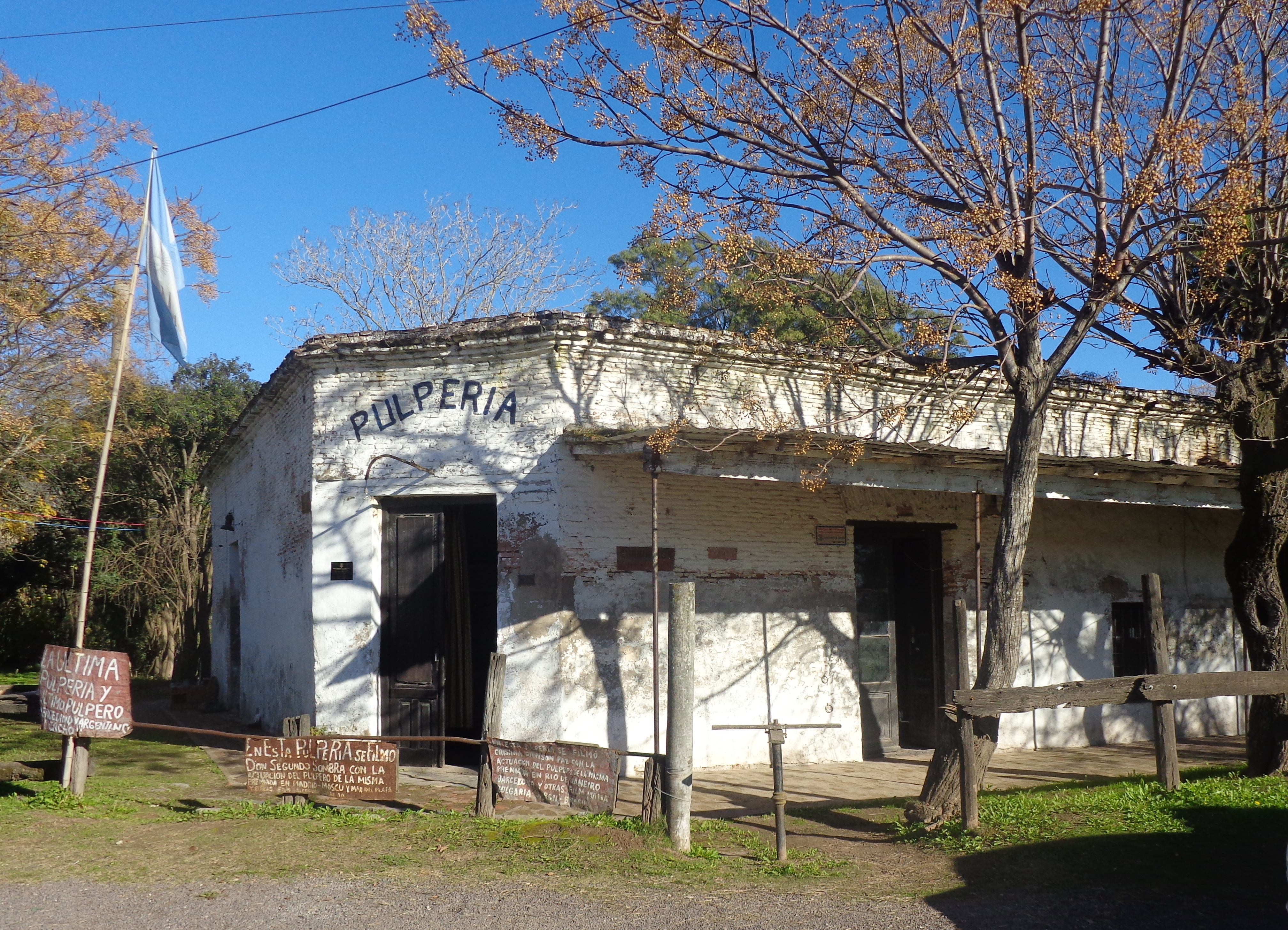 Pulpería construida en 1830, en Mercedes, Provincia de Buenos Aires, Argentina.